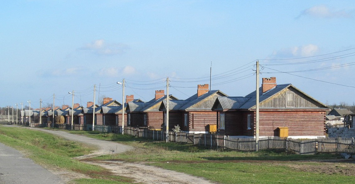 Аграгарадок Баравое, Лельчыцкі раён